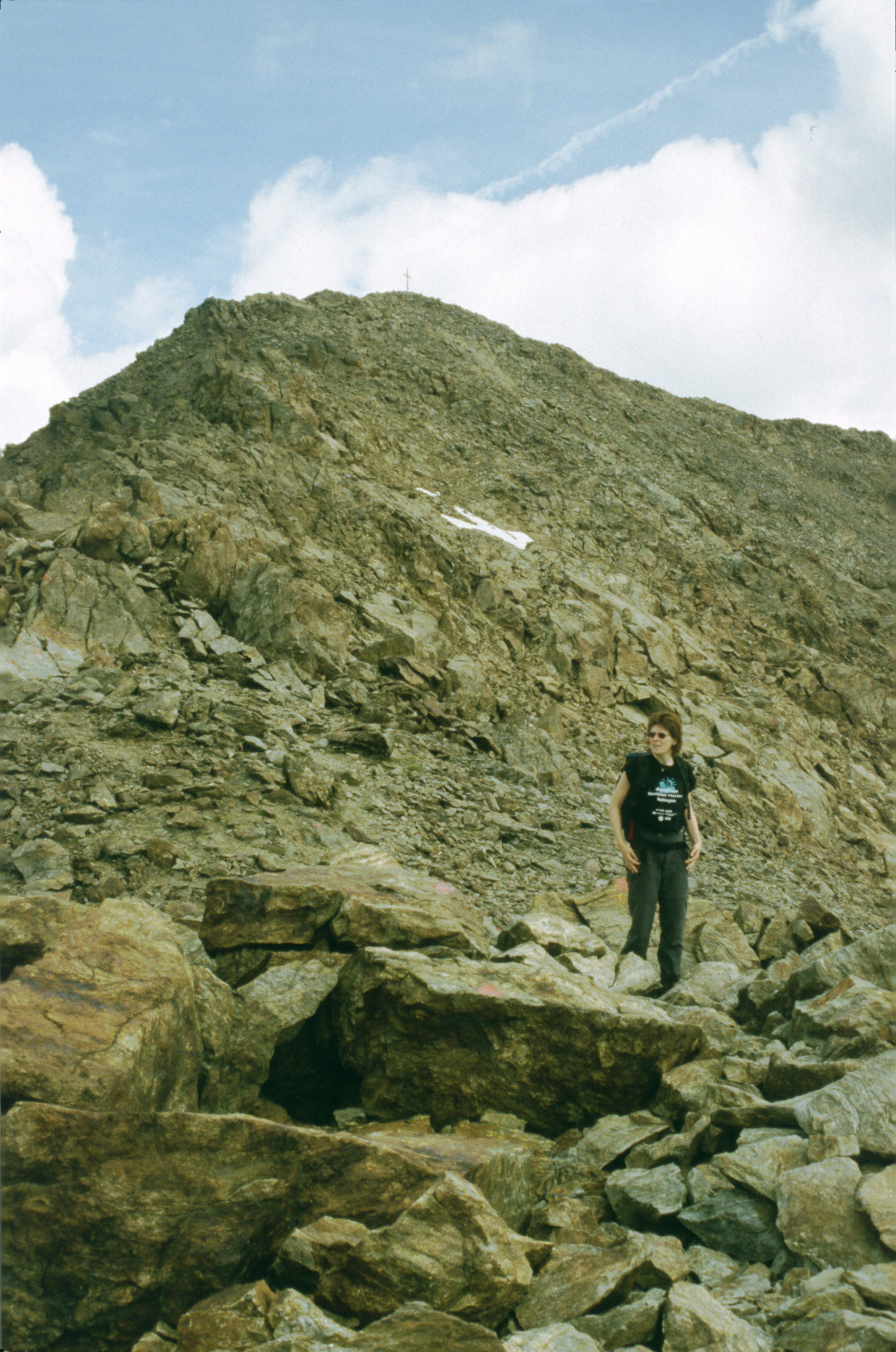 Mittagskogel von Südwesten. Aufgenommen am 23.08.2002.